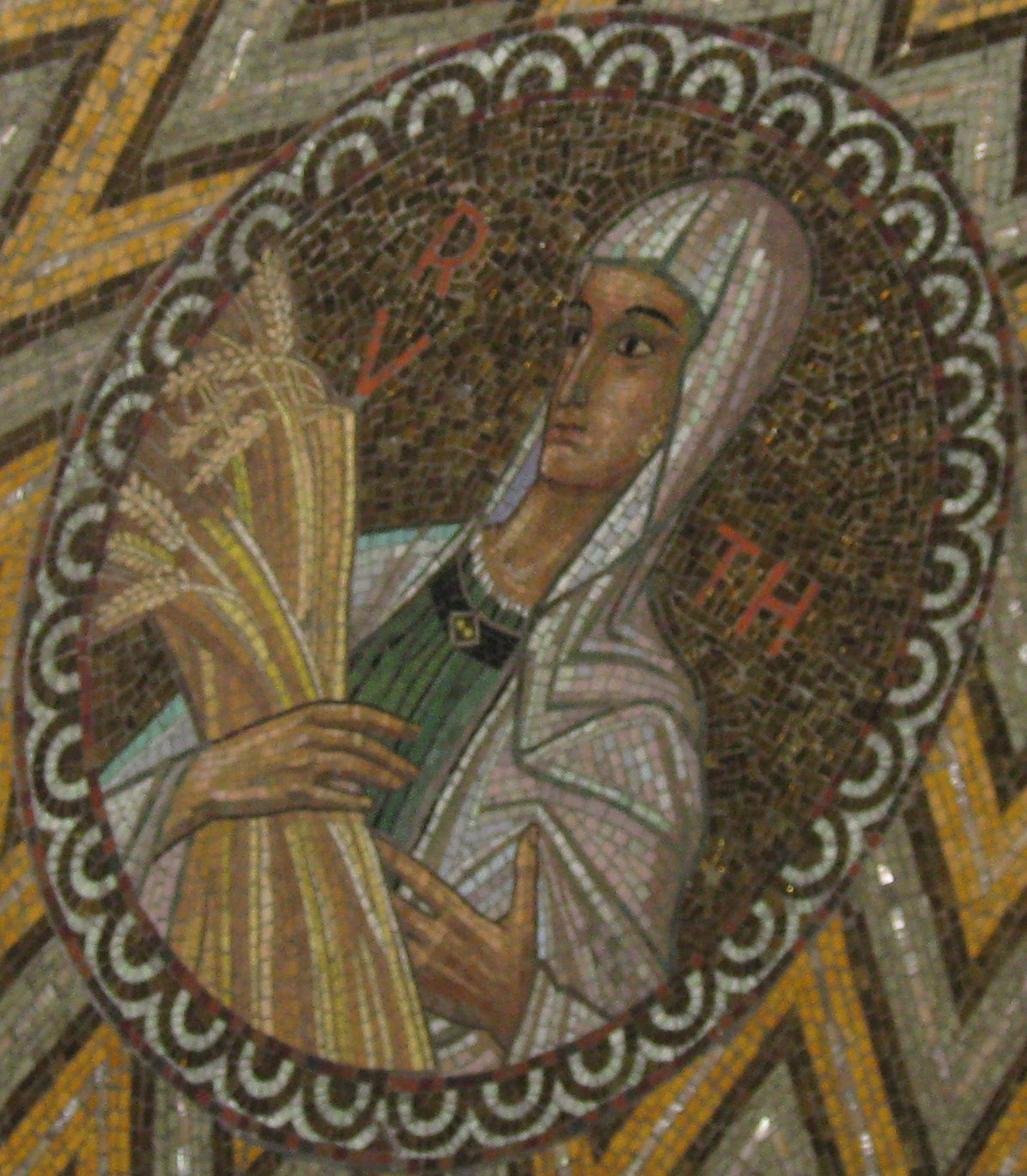 The Dormition Church on Mount Zion in Jerusalem כנסיית הדורמיציון על הר ציון בירושלים